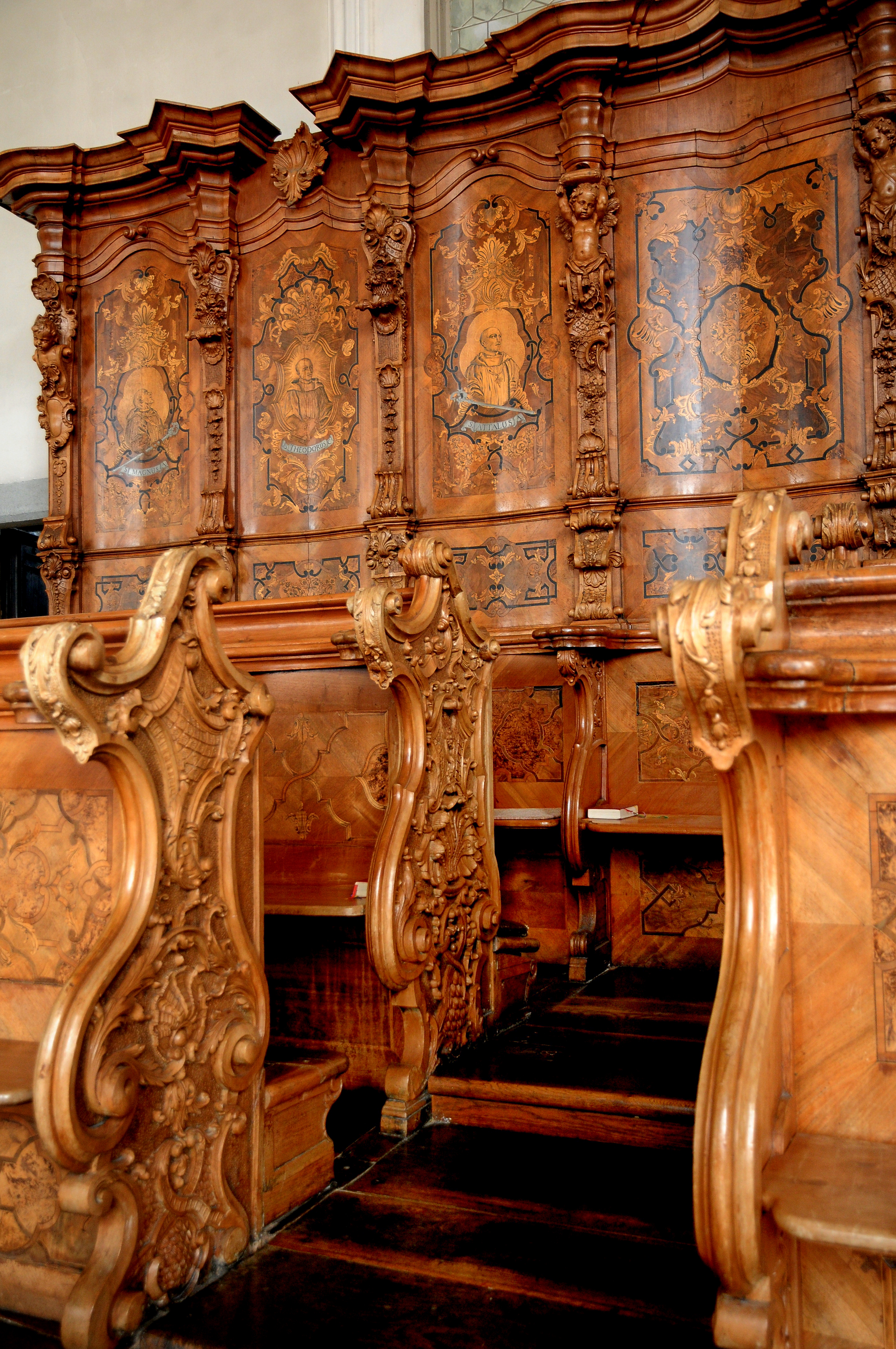 Barockes Chorgestühl in der Stadtpfarrkirche St. Gallus, um 1740 von Johann Joseph Christian für die Abteikirche Mehrerau gefertigt (seit 1808 in St. Gallus). *** Veröffentlicht: Alois Niederstätter in "Geschichte Vorarlbergs Band 2 Vorarlberg 1523 bis 1861 Auf dem Weg zum Land ISBN 978-3-7030-0864-1 2015